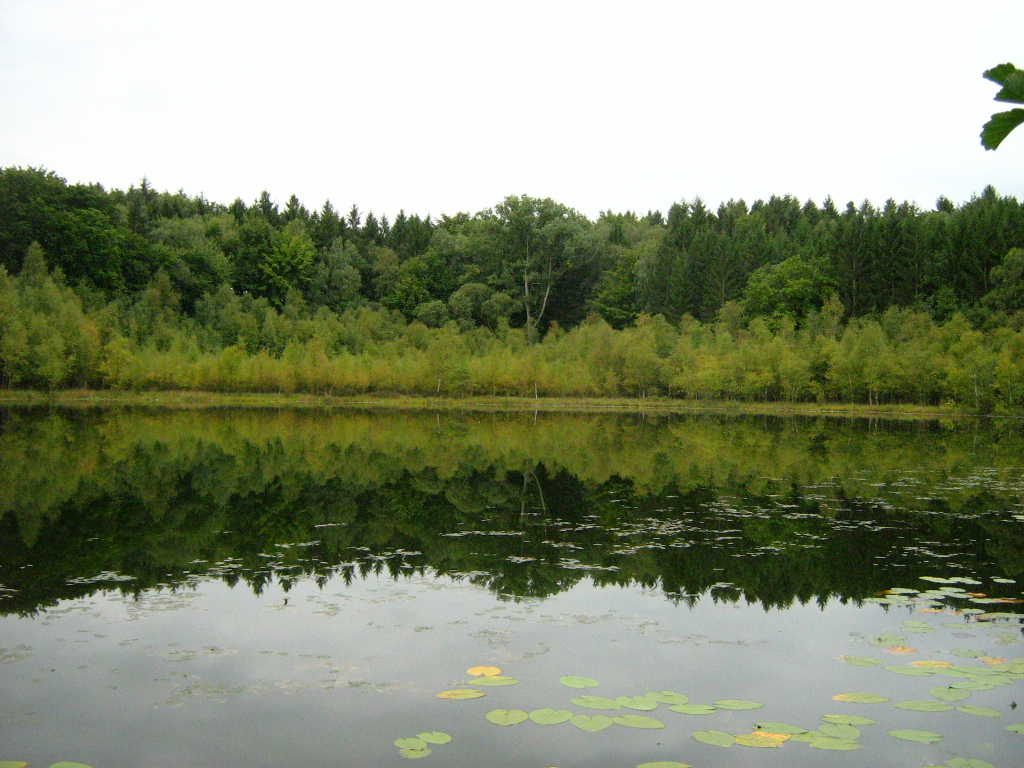 Der Teufelssee ist ein kleiner Waldsee in der schluchtigen Landschaft der südlichen oberen Terrasse des Recknitztales bei Liepen in der Gemeinde Thelkow im mecklenburgischen Landkreis Bad Doberan. Der See liegt in einem Kessel, die Verlandungszonen sind hochmoorartig. 54°3′6.38″N 12°33′27.85″E / 54.0517722°N 12.5577361°E